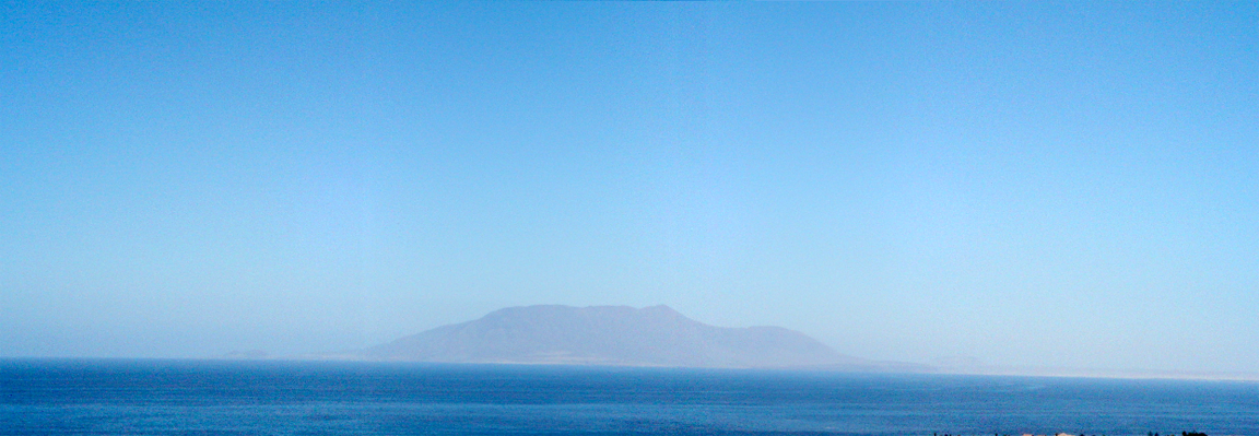 Cerro Moreno y Bahía de San Jorge. Cerro Moreno, sector de ubicación del Balneario Juan López y el Aeropuerto Internacional Cerro Moreno. Antofagasta, Chile. Source: [1] Date: 28/10/2005 Author: Marcos Escalier